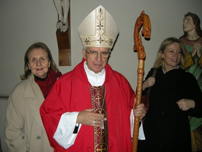 Bendición del Sagrado Corazón en el Patio de la Parroquia Nuestra Señora de la Divina Providencia, Santiago , por el Nuncio Apostólico Monseñor Ivo Scapolo.